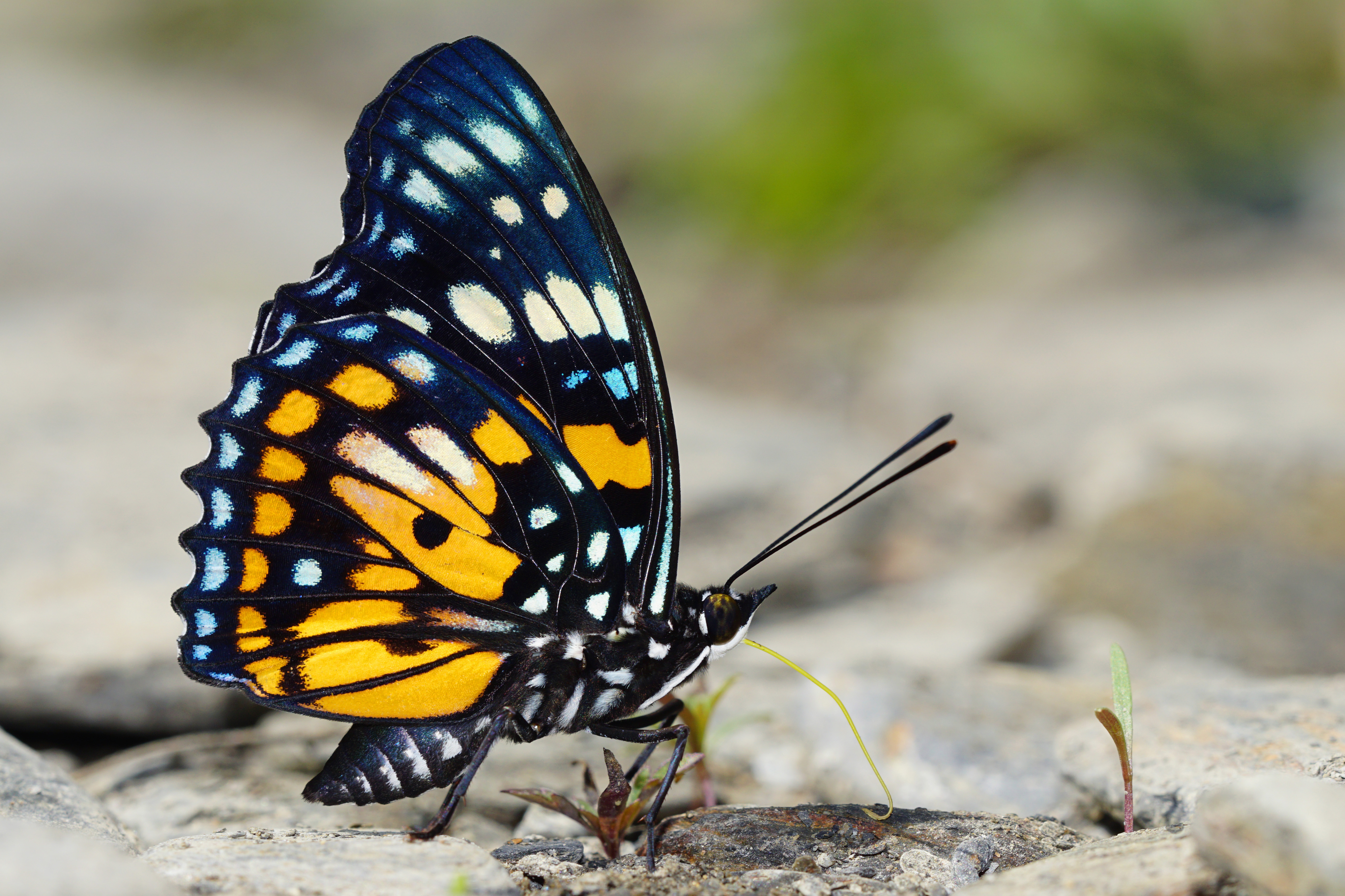 燦蛺蝶 Sephisa chandra androdamas 雄